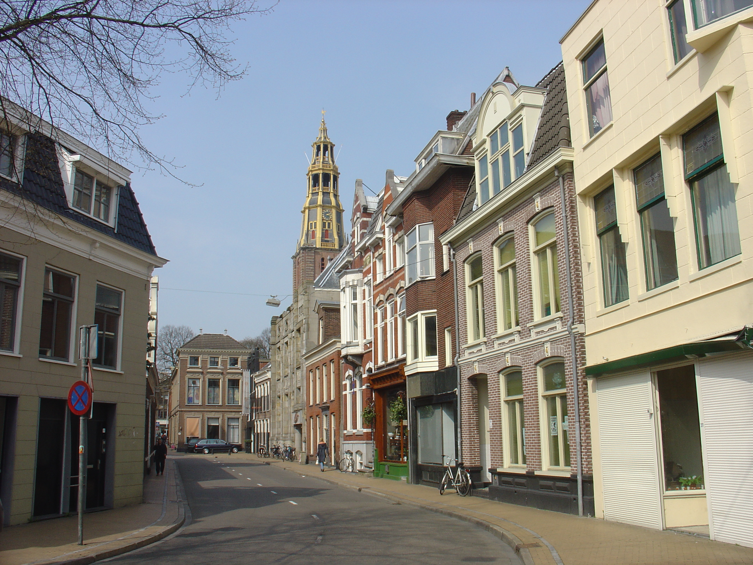 2006-04-25 Groningen 064